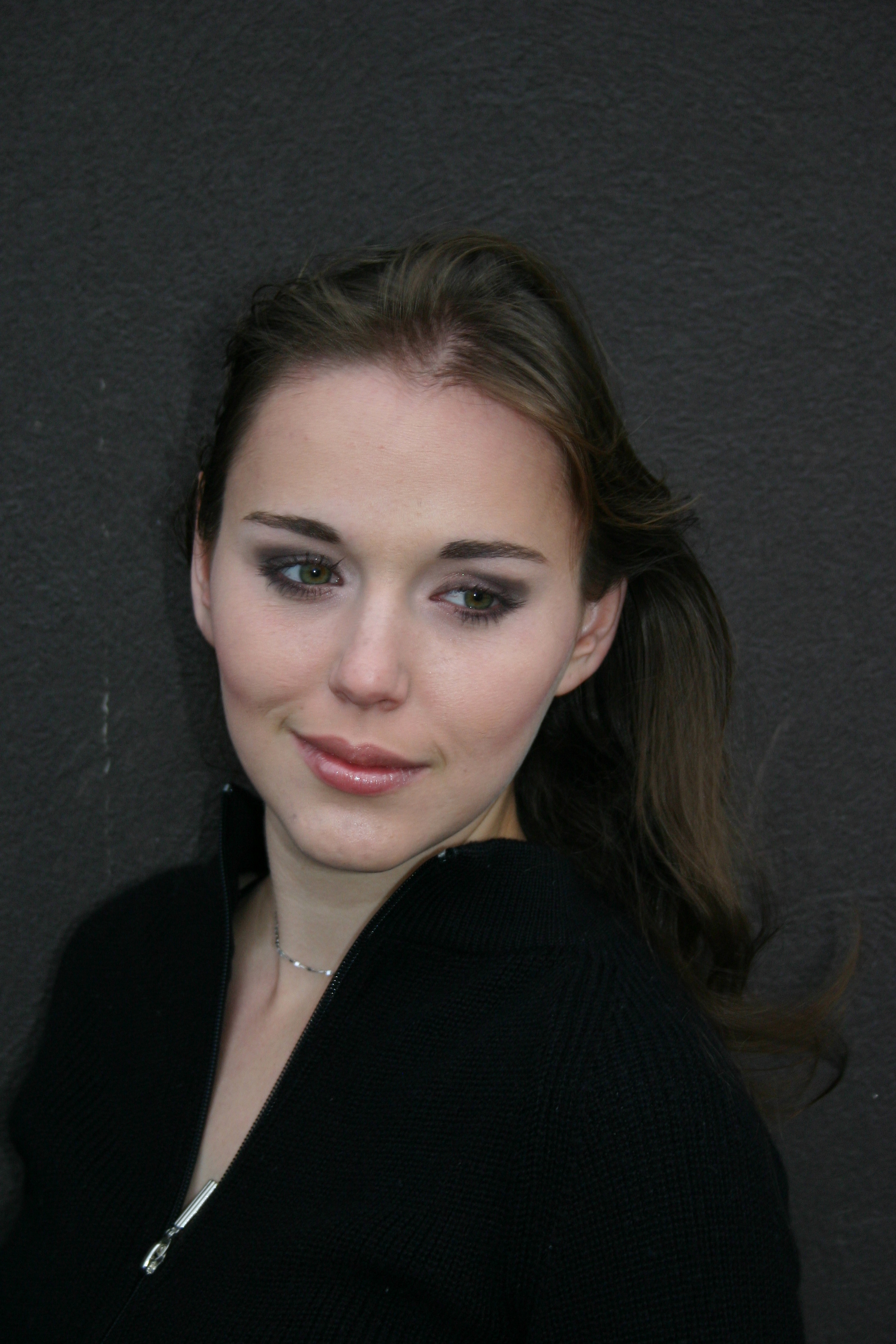 אסיה נייפלד